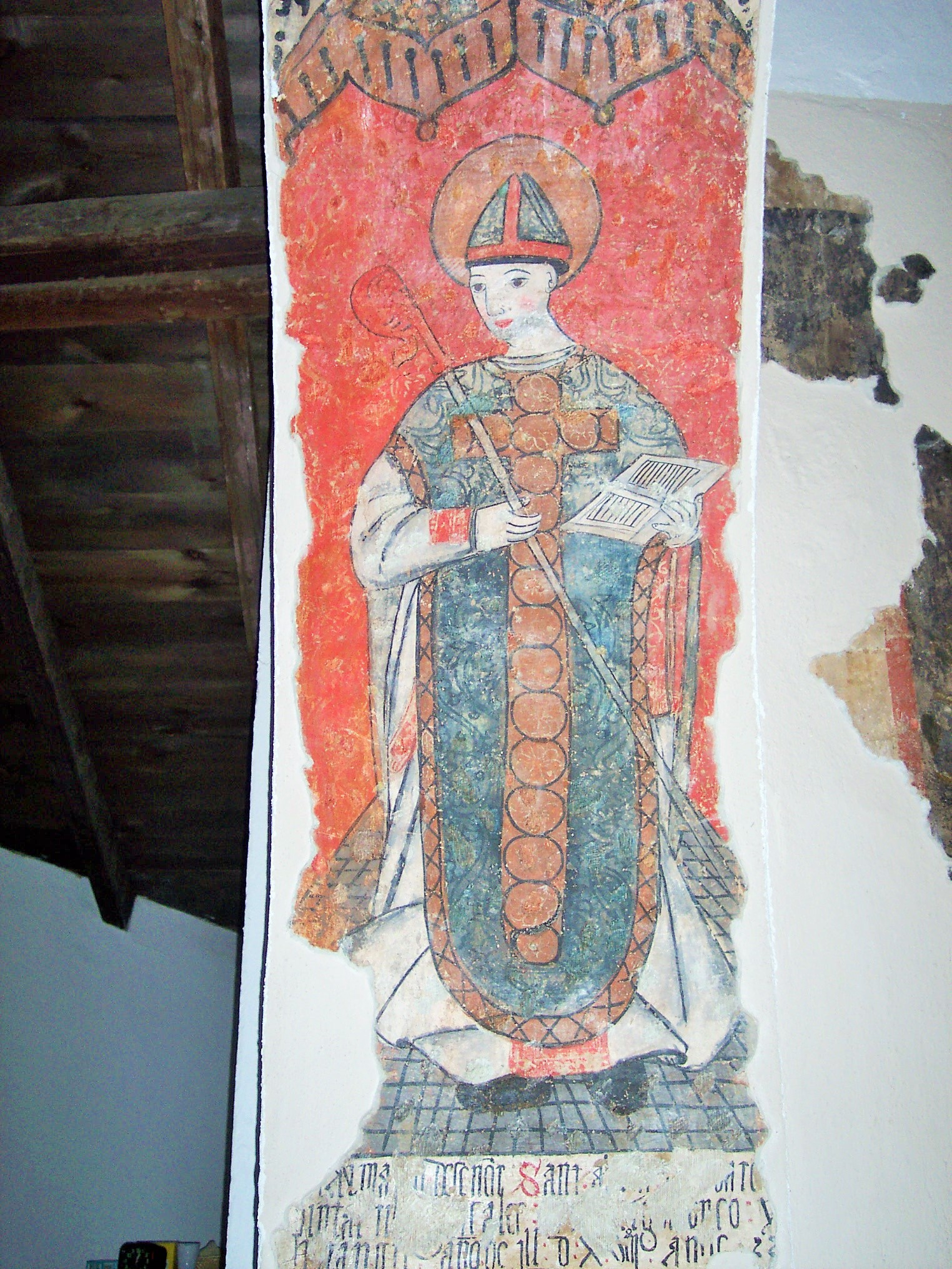 Pinturas murales iglesia de Santiago en Capilla-Badajoz